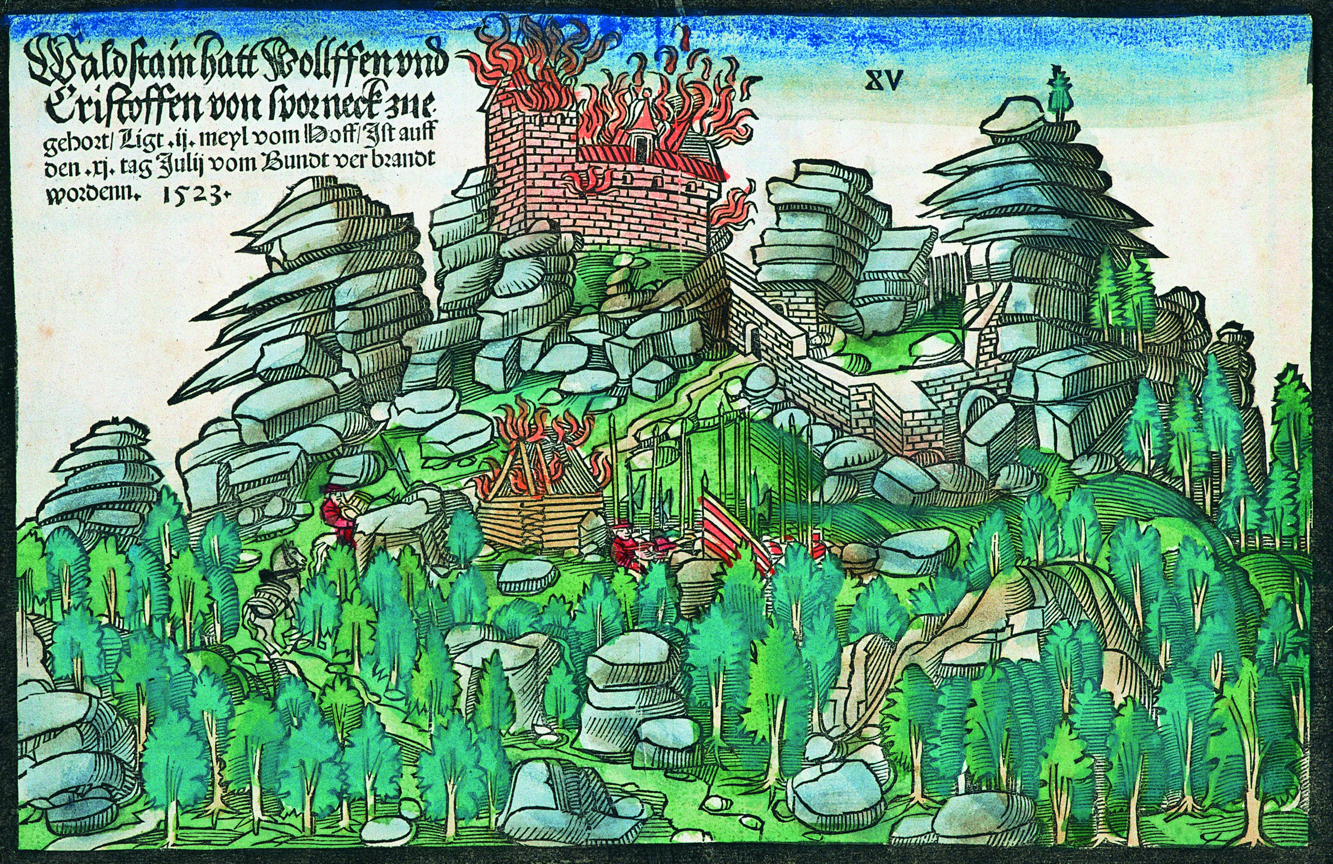 Bild aus dem Burgenbuch der Staatsbibliothek Bamberg, Staatsbibliothek Bamberg, RB.H.bell.f.1